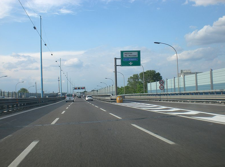 A57